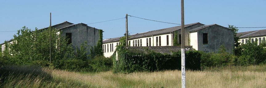 Ancien complexe militaro-hospitalier de l'OTAN, fermé en 1967, limitrophe avec Croix-Chapeau, situé à Aigrefeuille-d'Aunis, département de la Charente-Maritime, région Poitou-Charentes, France.